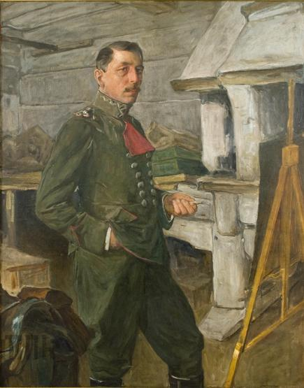 Autoportret Stanisława Janowskiego namalowany techniką olejną w roku 1918 na bazie fotografii z połowy 1916 roku. Na obrazie Stanisław Janowski w mundurze 2 pułku ułanów Legionów Polskich, gdzie służył w czasie I wojny światowej.